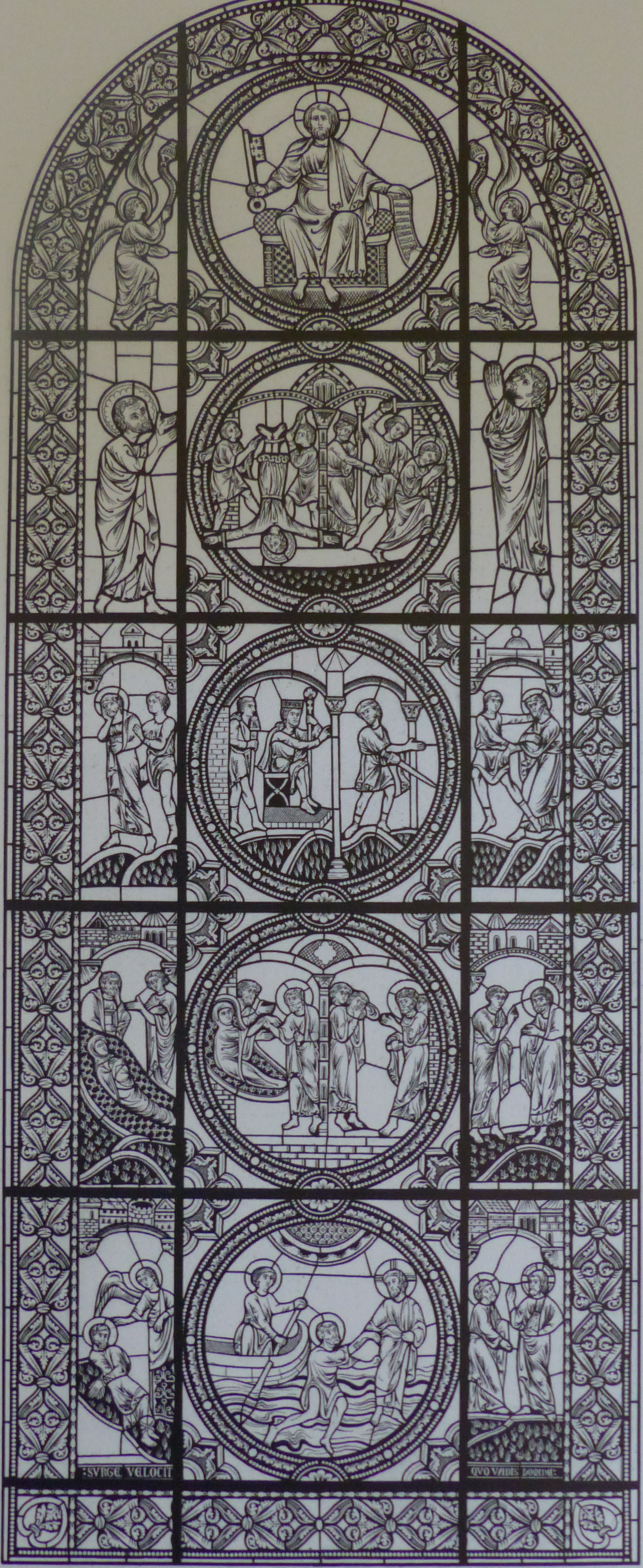 Primatiale Saint-Jean de Lyon - Vitrail de Saint-Pierre, dans la chapelle du même nom ; seul vitrail roman subsistant de la primatiale, et le plus ancien (fin du XIIe siècle). Dessin du vitrail par Lucien Bégule (1880).